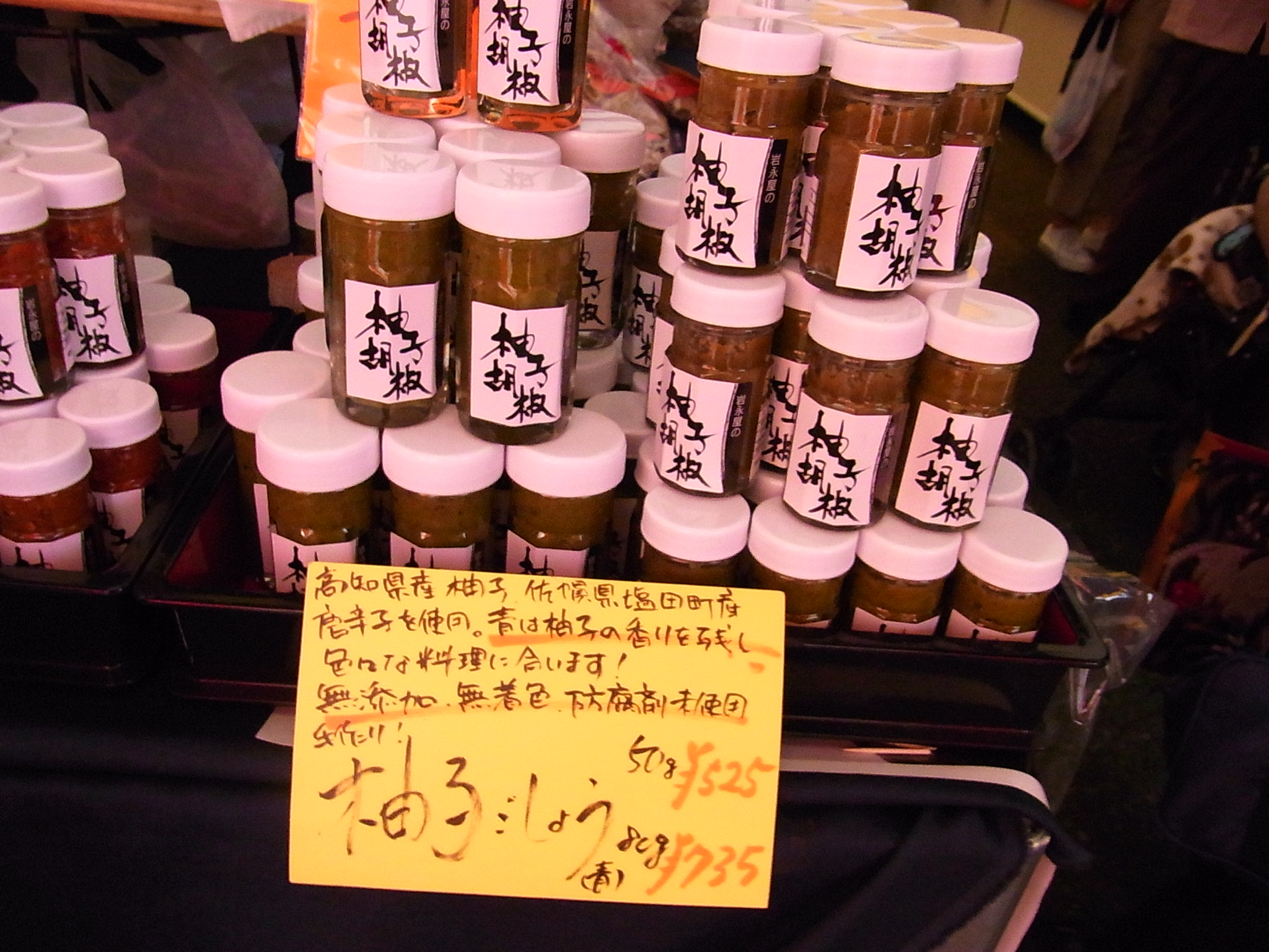 柚子こしょう